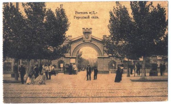 Вход в городской сад (ныне парк им. Горького)